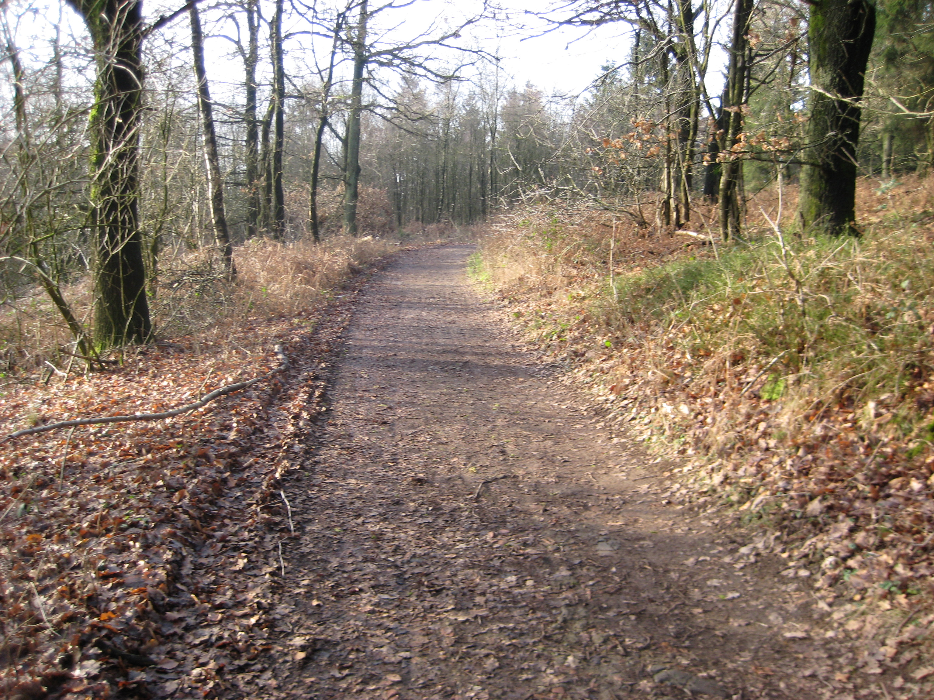 Hermannsweg am Dörenberg, Niedersachsen